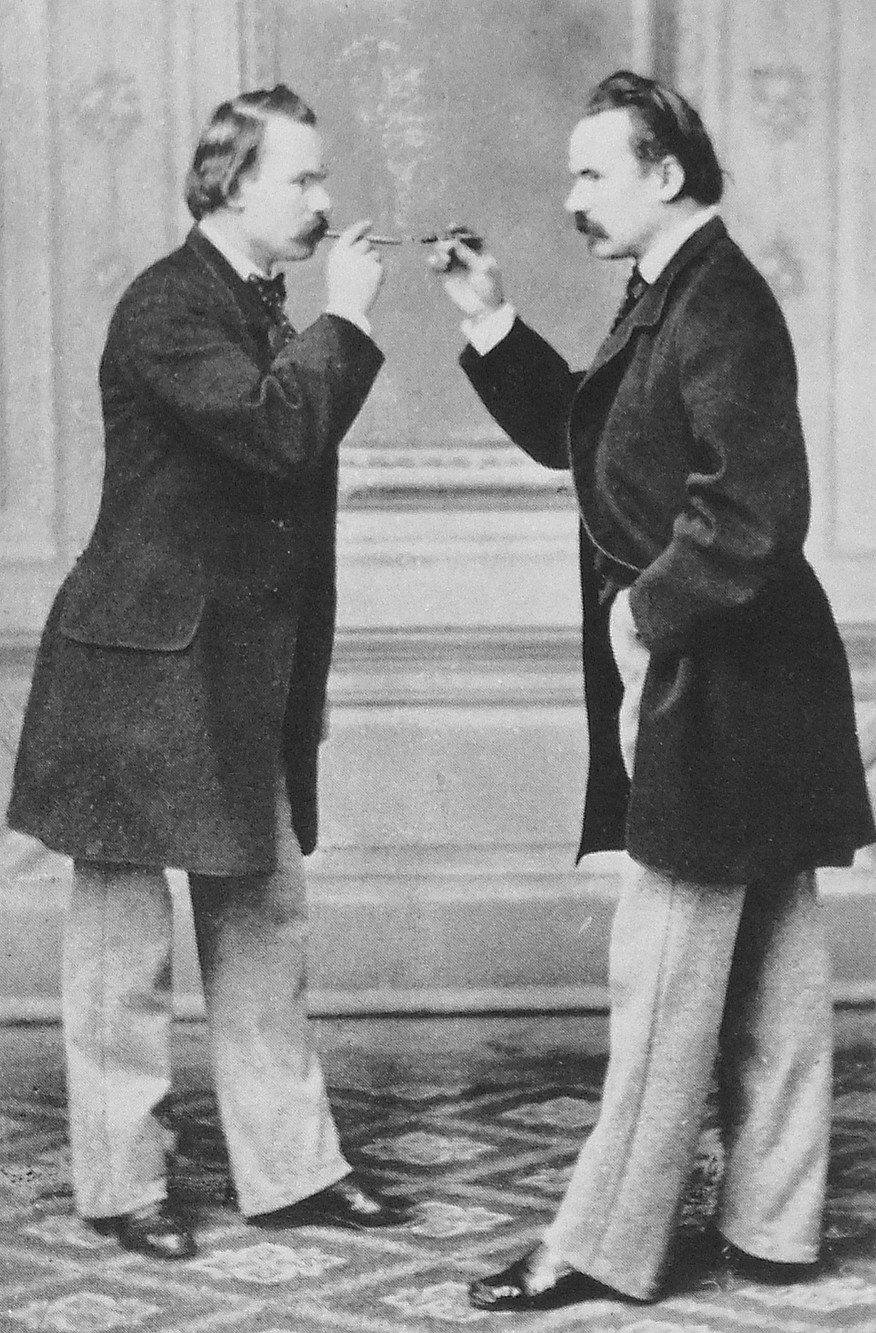 Friedrich Brandseph reicht Friedrich Brandseph Feuer (Doppelgängertrickaufnahme; beim genauen Hinschauen sieht man in der Mitte die Verbindungslinie von zwei Fotos, die mit Rauch etwas verdeckt wurde)